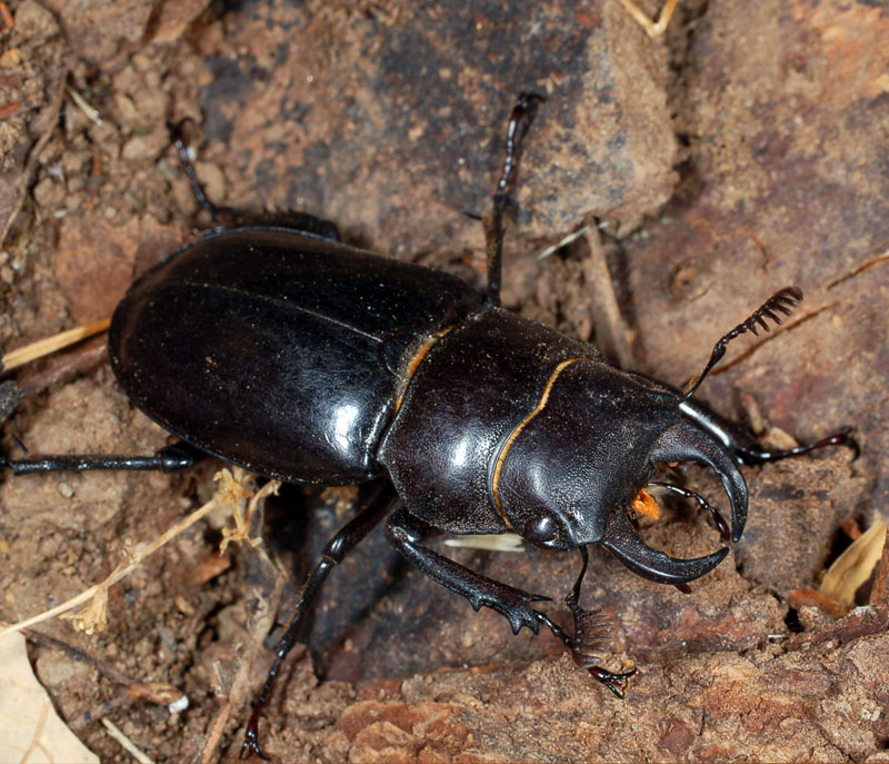 Lucanus barbarossa ejemplar macho